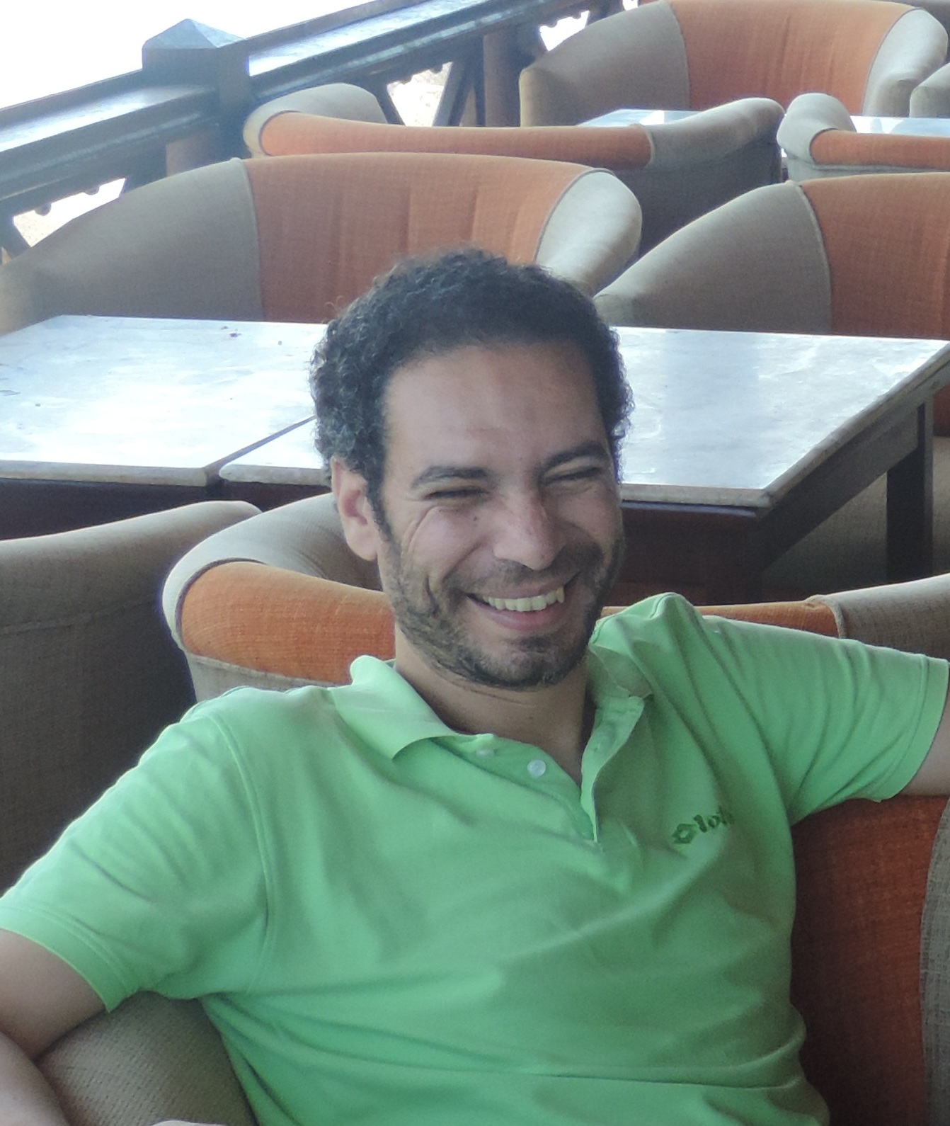 صـورة للسيناريست وائل حمدي